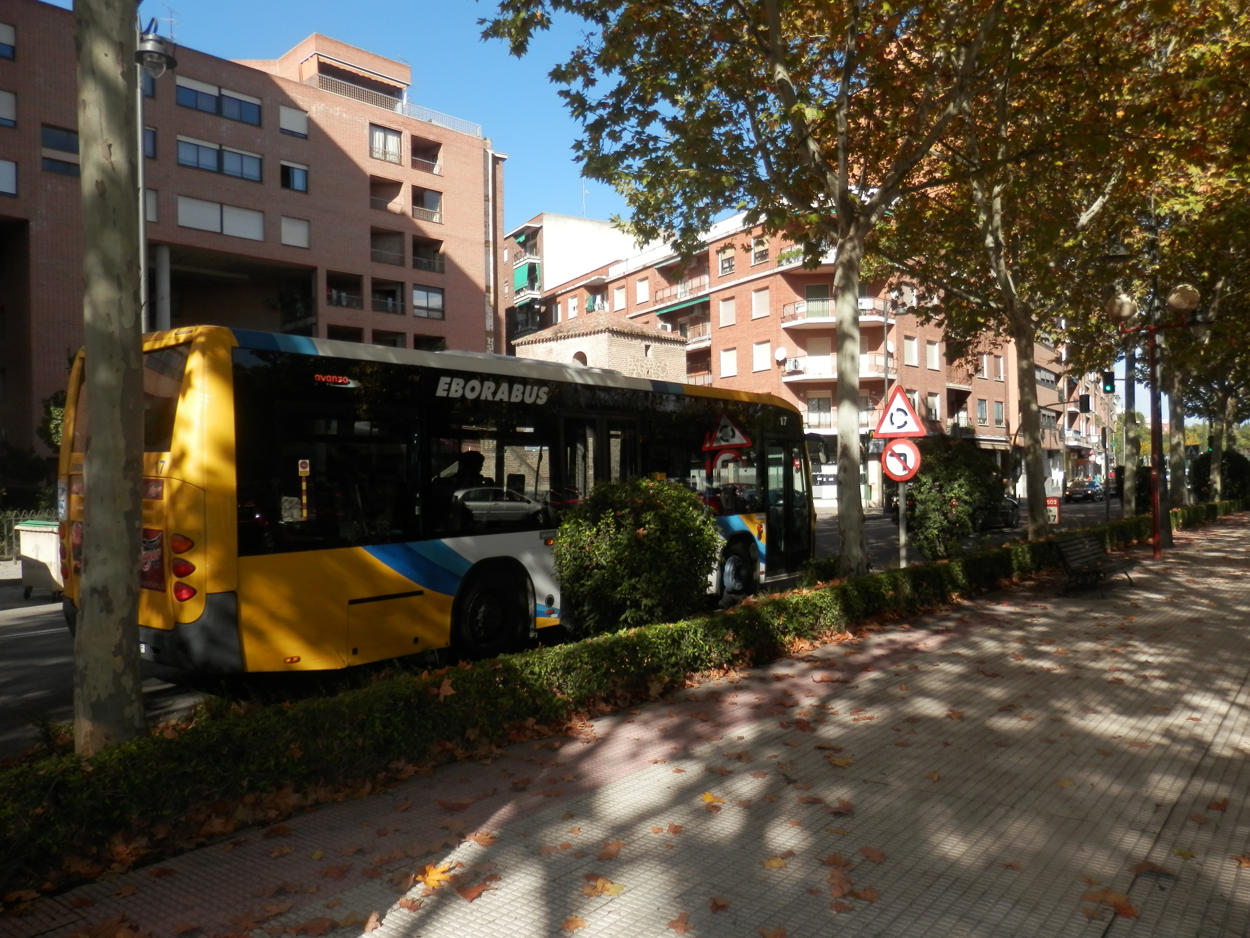 Autobús urbano de Talavera